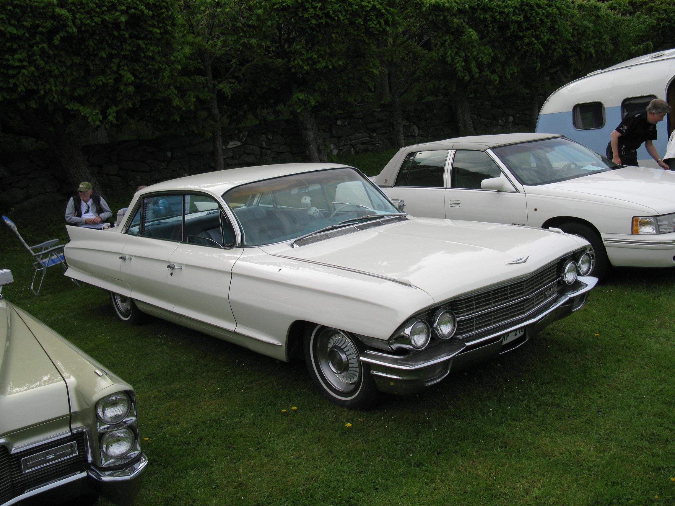 Cadillac De Ville 1962